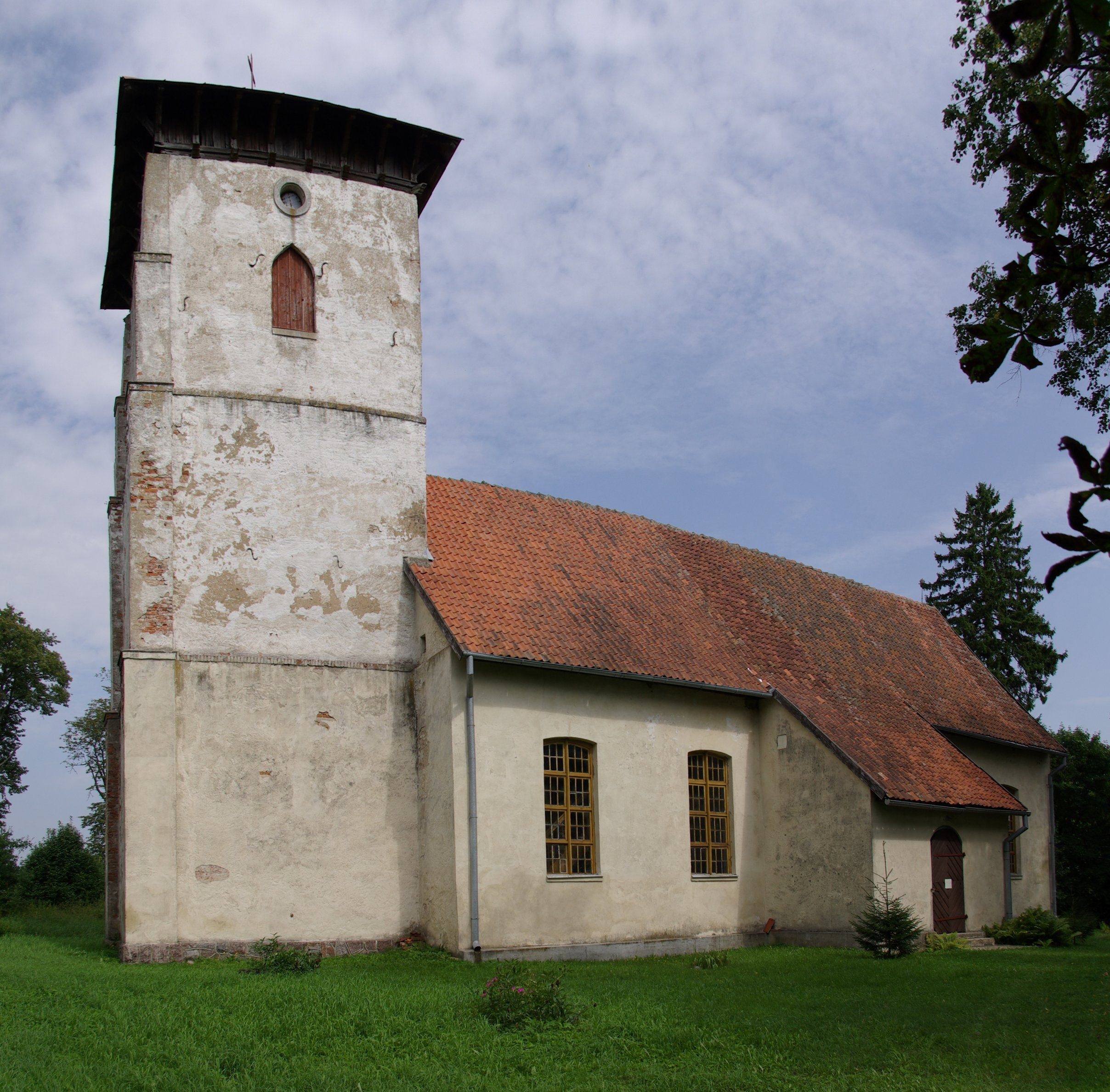 Dąbrówka - dawny kościół ewangelicki, obecnie rzymskokatolicki filialny p.w. NMP, 1732